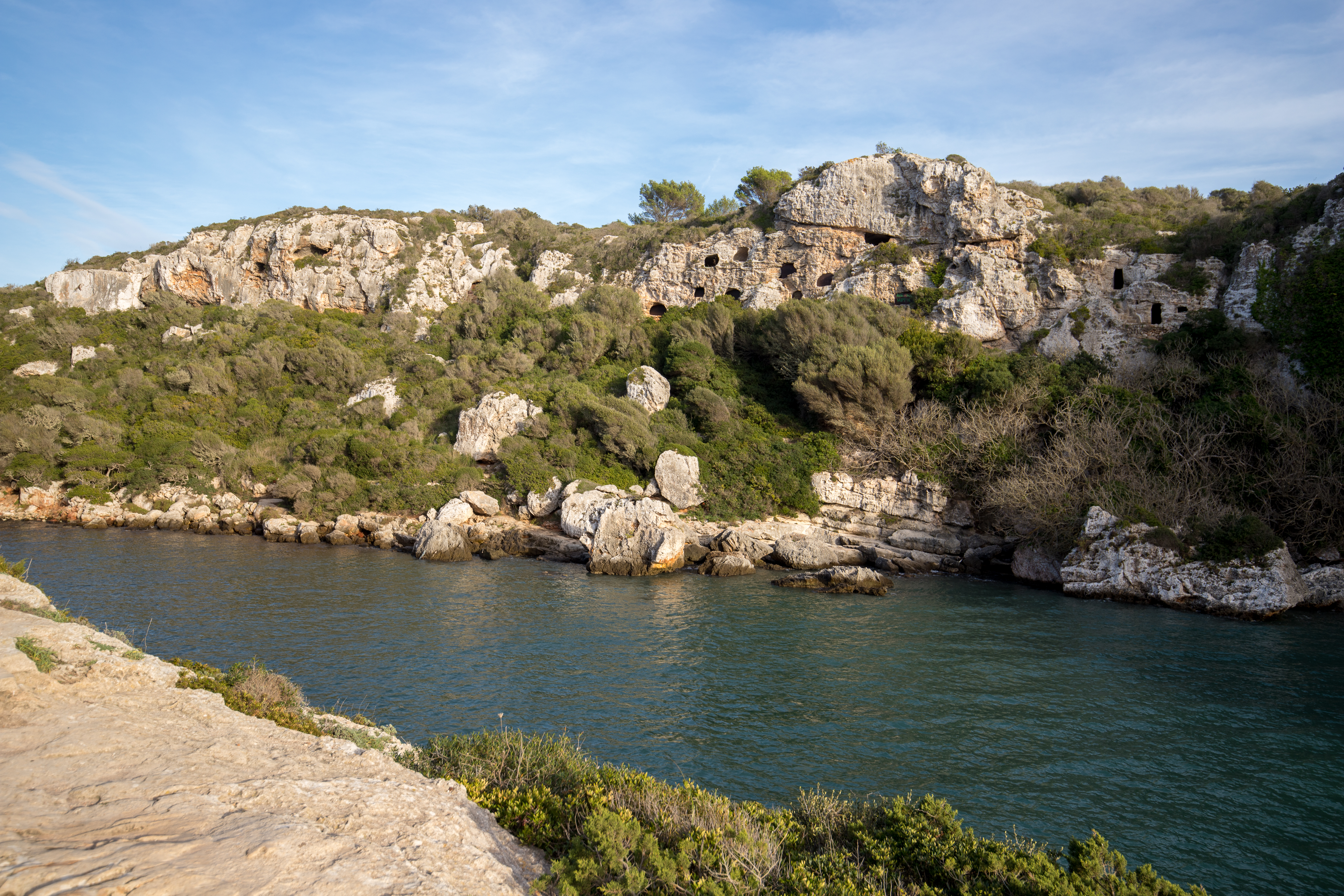 Vista de la Necròpolis talaiòtica de Calescoves